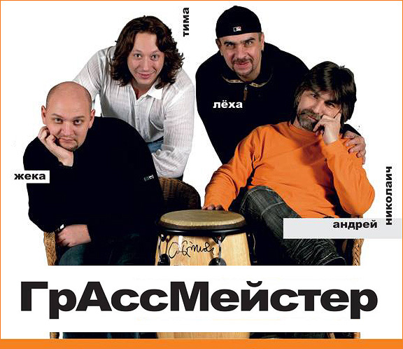 группа "Грассмейстер"